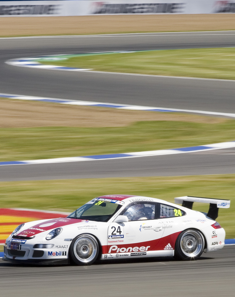 Porsche Michelin Supercup Race - Sebastiaan Bleekemolen.Bleekemolen, All alone...